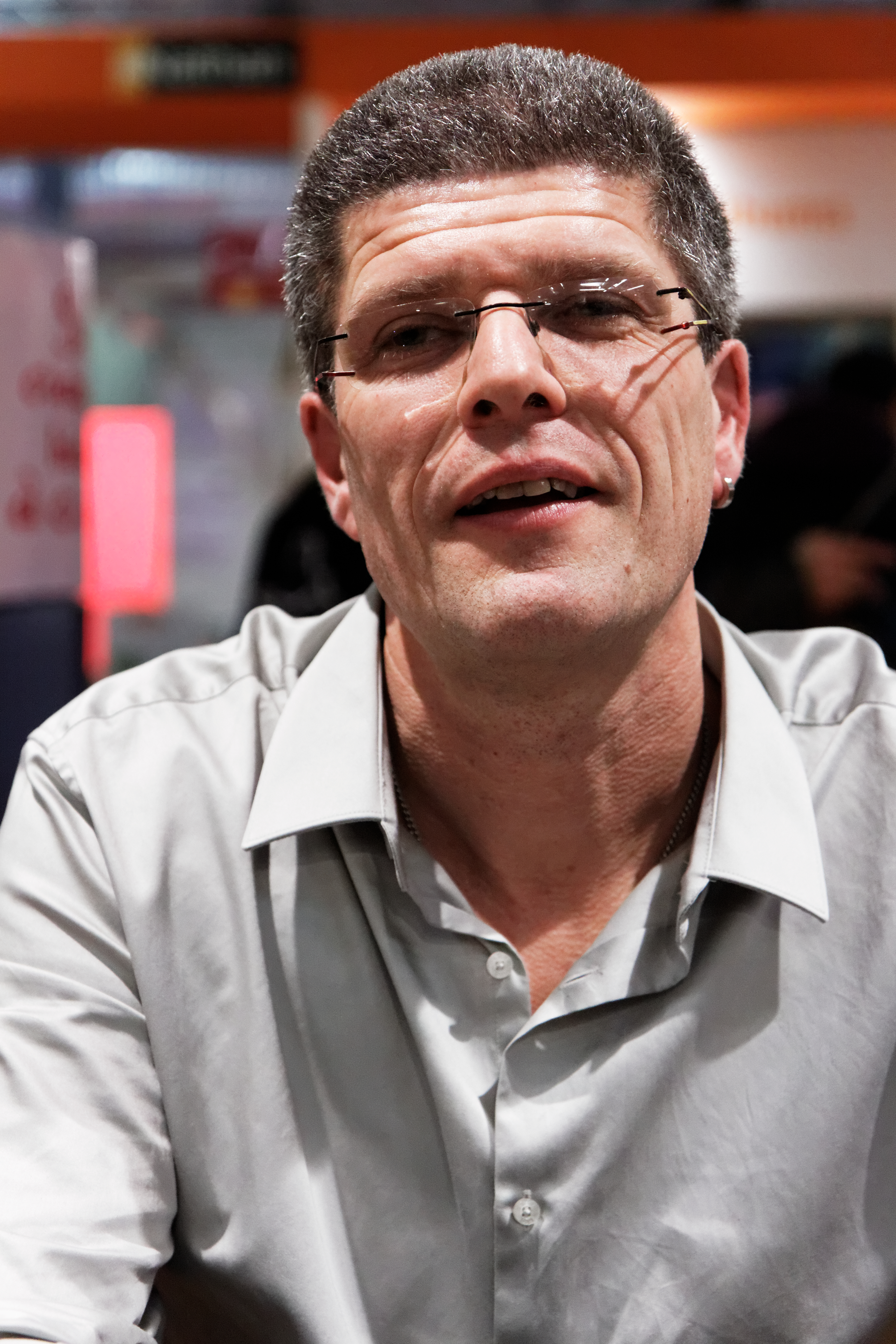 Eric Sanvoisin en dédicace au salon du livre jeunesse 2012 de Montreuil.